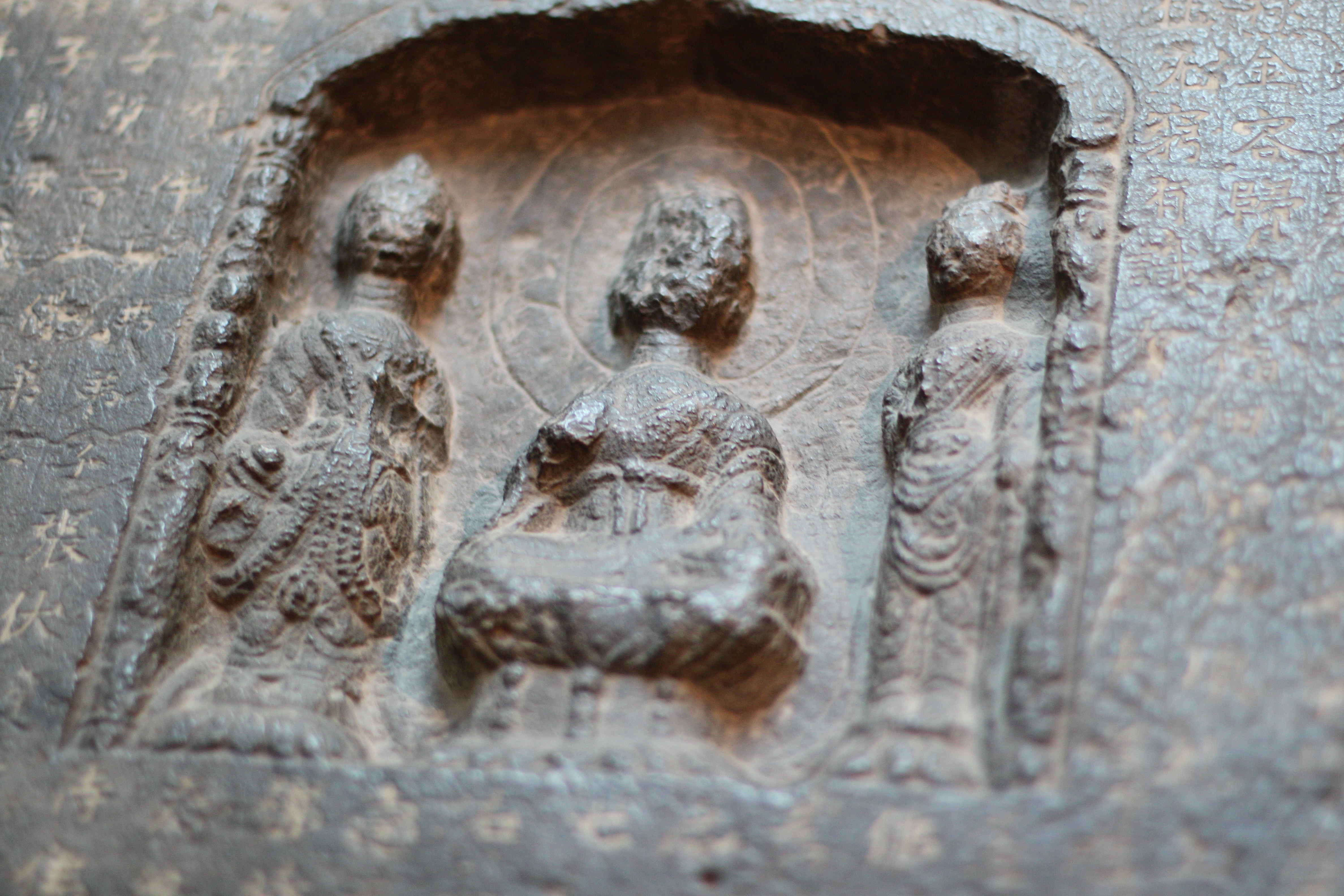 Grabstein aus der Zeit der Han-Dynastie; China; 2. Jahrhundert n. Chr.; Steinrelief; Teil eines Reliefs vom Grab der Familie Wu in Jianxiang; Provinz Shangdong; die Reliefplatte wurde mit der behauenen Oberfläche nach innen in die Wände der Totenkammer eingebaut; sie war ausschlließlich für die Toten bestimmt.; im Überseemuseum